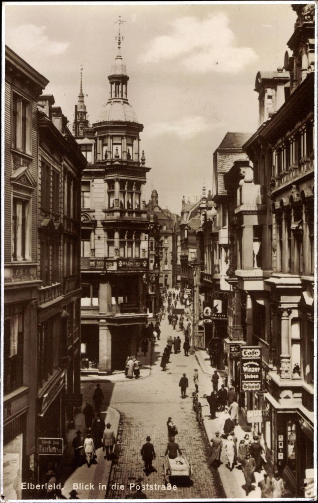 Blick in die Poststraße von Elberfeld, heute Wuppertal.